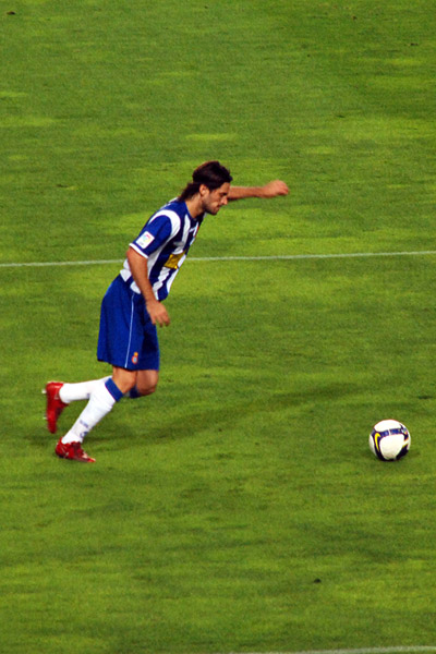 DDaniel Jarque al partit Espanyol-Villareal.